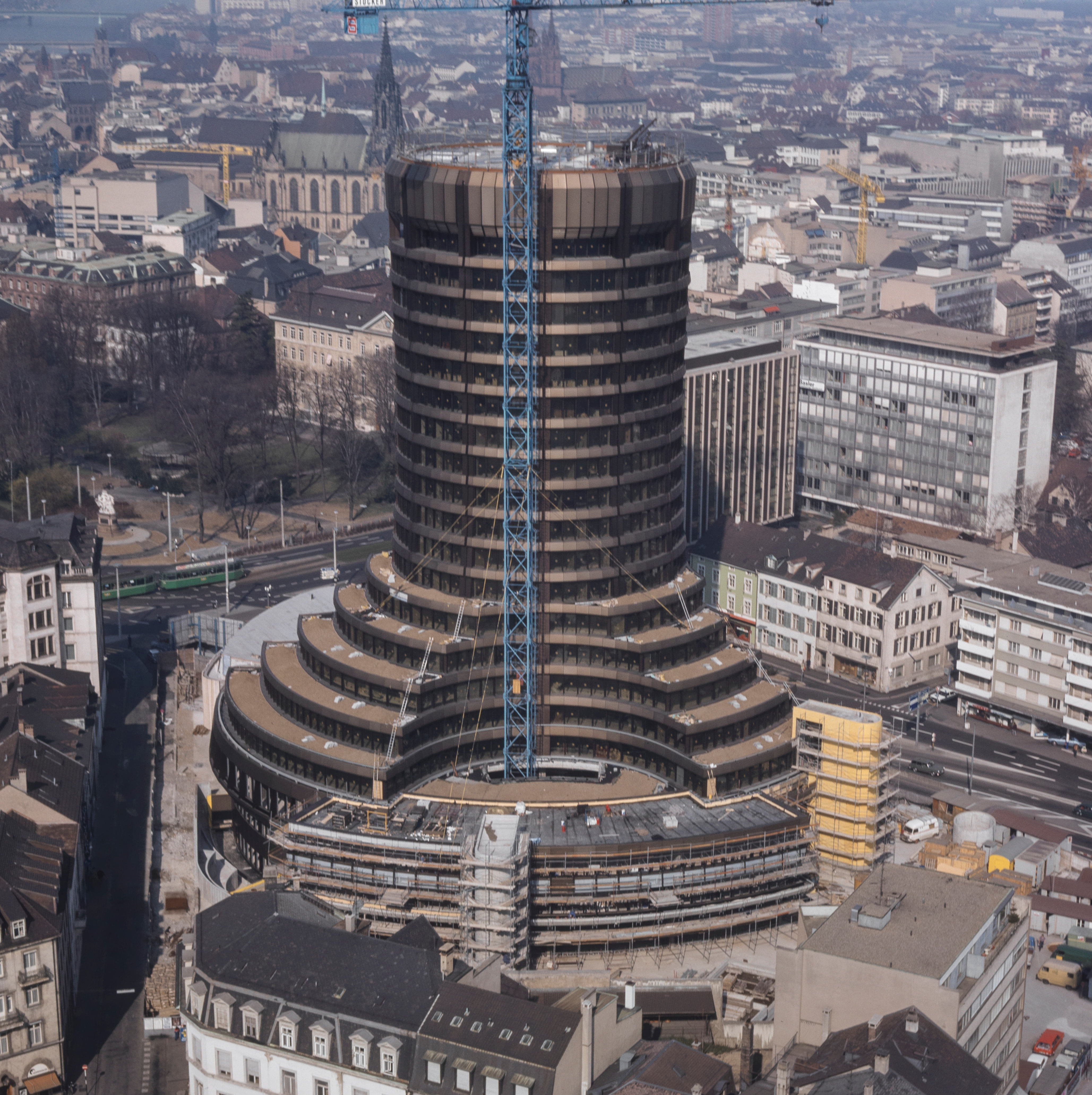 Basel: Luftbild von Südosten mit BIZ-Turm, Bauarbeiten im März 1976